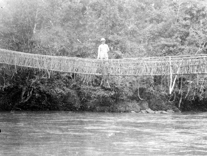 Repronegatief. Een Europeaan staat op een rotanbrug in het Mamasa-gebied, Toradjalanden, Celebes